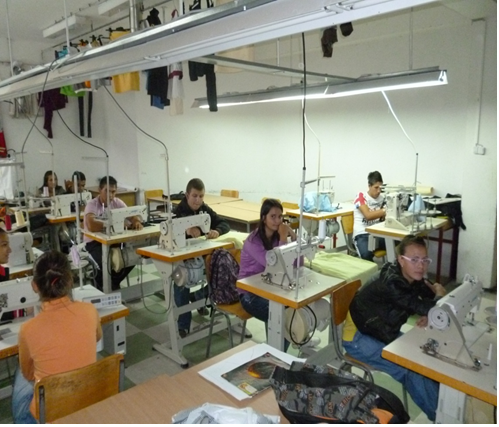 Една од просториите за практична настава.